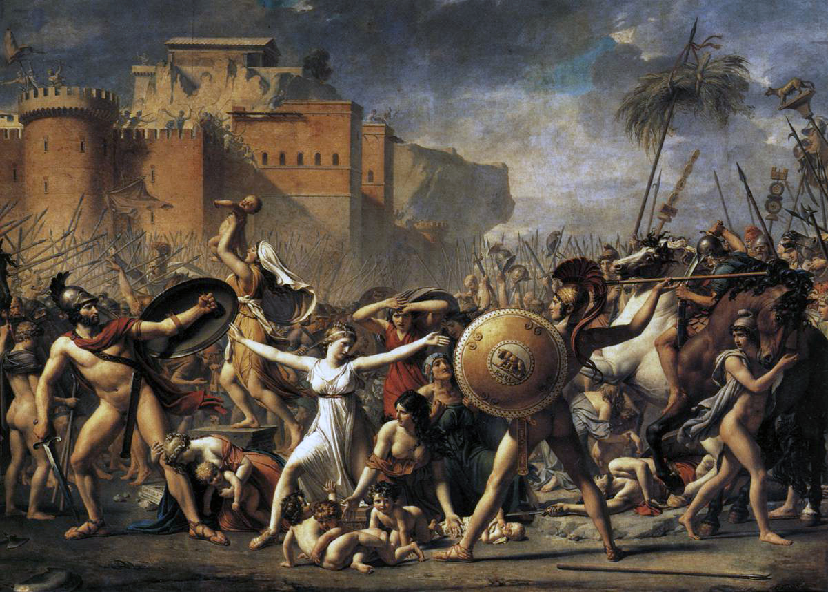 Donne e bambini che si interpongono tra i loro uomini e i romani.C'è un invito a una riconciliazione nazionale